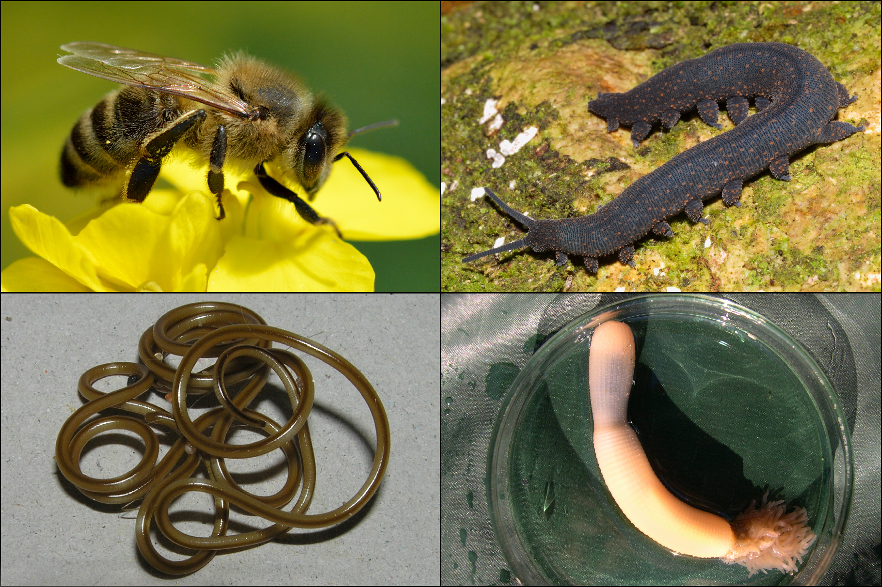 Collage de ecdisozoos basado en imágenes de Commons.